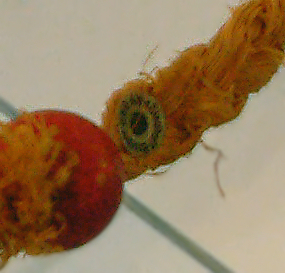 Patentmarke an Wurfpuppe von Alma Siedhoff-Buscher im Bauhaus-Museum Weimar